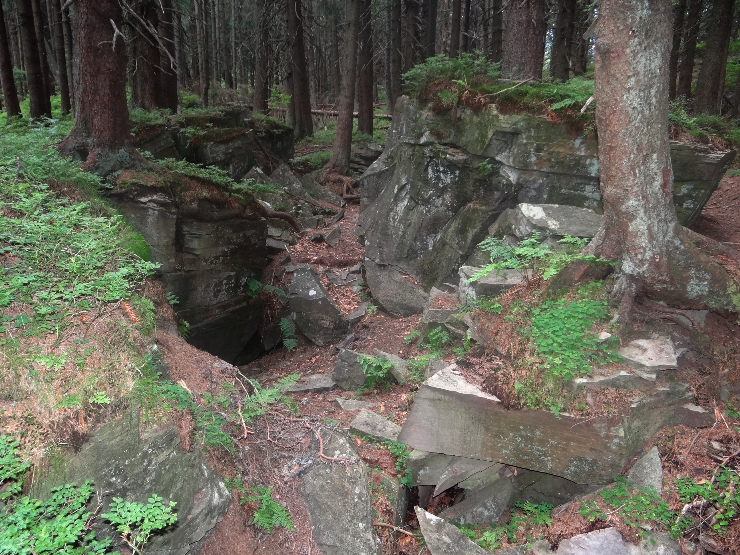 Skałki i rozpadliny w masywie Buczynki w Beskidzie Żywieckim